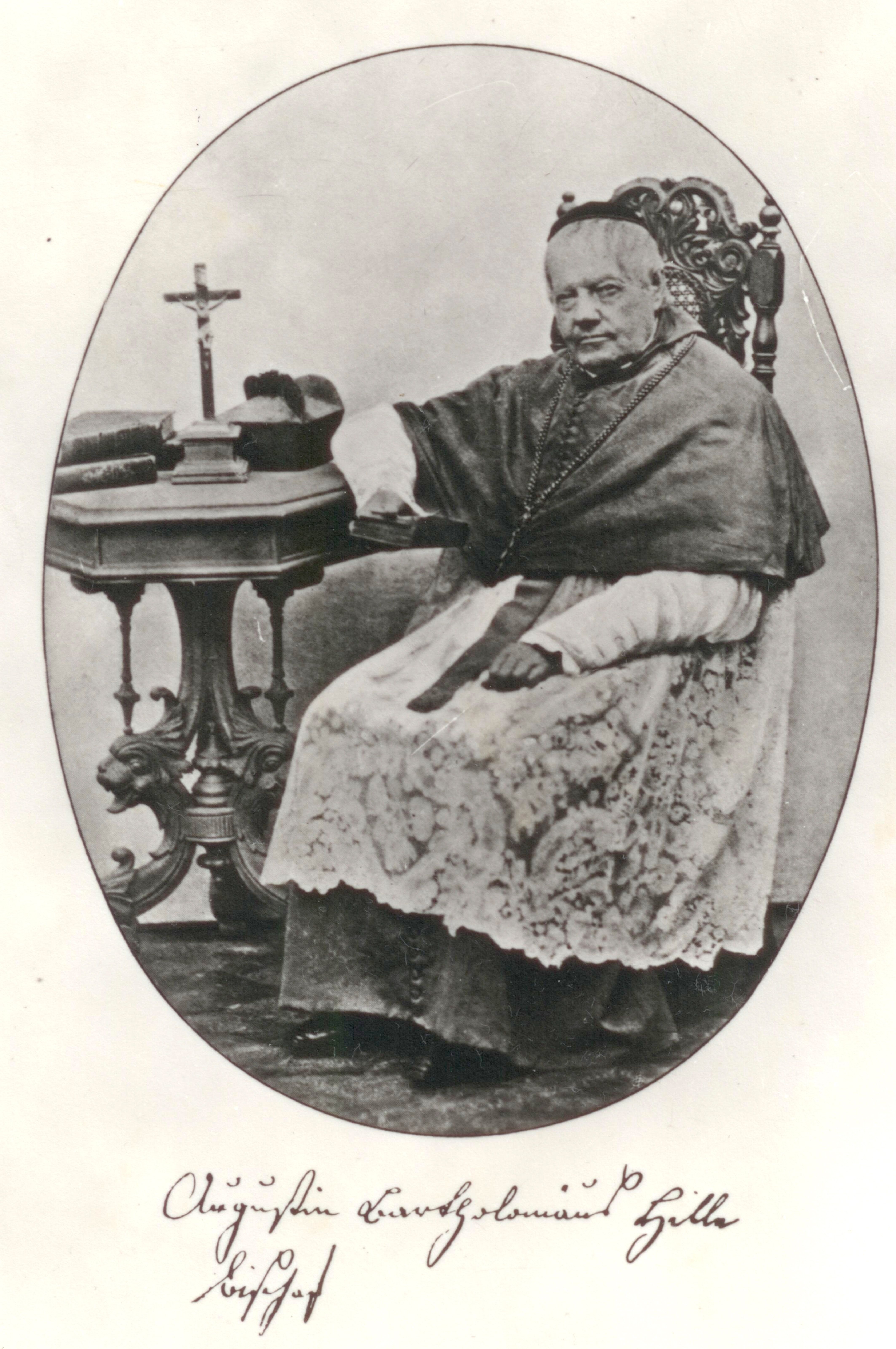 Augustin Bartoloměj Hille, 11. biskup litoměřický, portrét pochází ze sklonku života z roku 1865